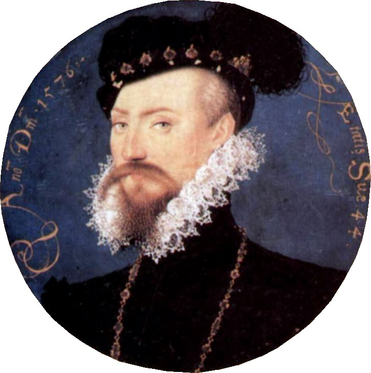 Porträt des Robert Dudley, Earl of Leicester, Tondo